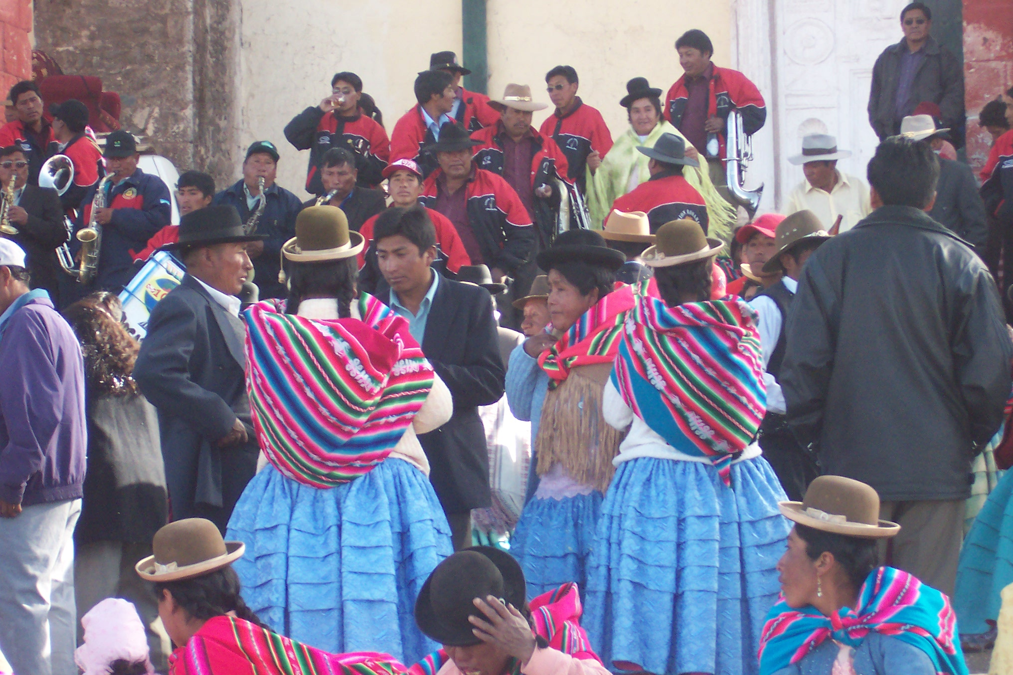 Casamiento popular en Chucuito, Puno, Perú